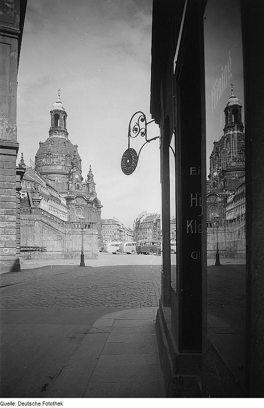 Original image description from the Deutsche Fotothek Dresden. Blick über den Jüdenhof zur Frauenkirche